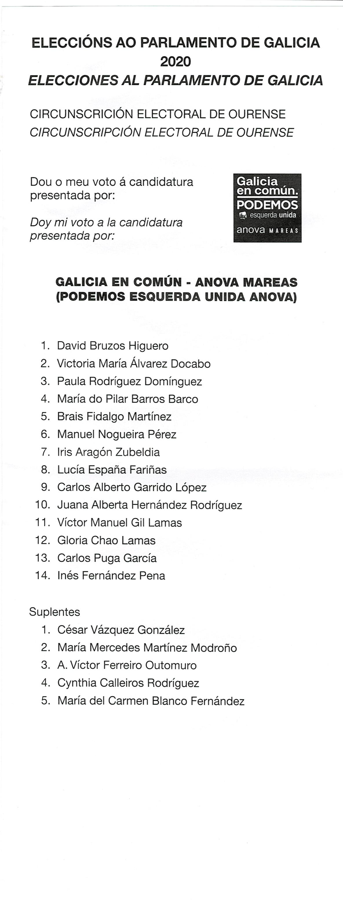 Papeletas electorais Eleccións ao Parlamento de Galicia 2020 pospostas circunscrición electoral de Ourense-Galicia en común Podemos